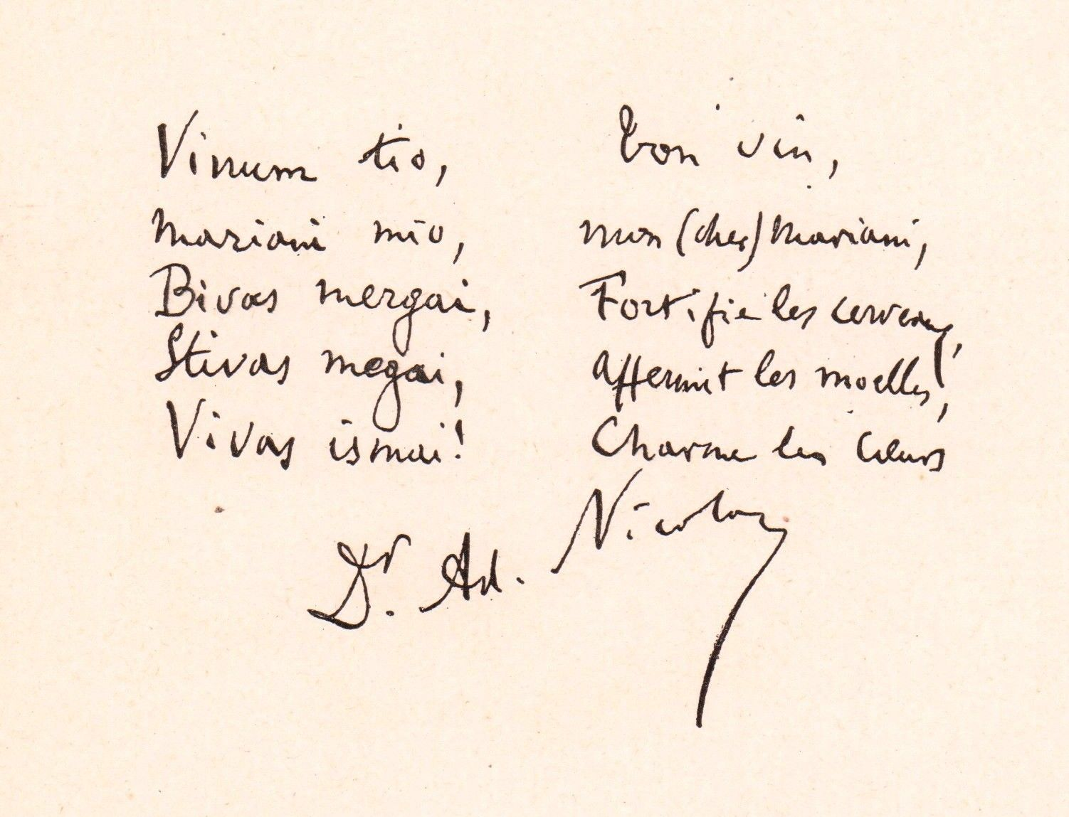 Manskribitaj versoj de Adolphe Nicolas, kiu montras paralelan version en Spokil kaj la franca, aldone al faksimilaĵo de lia aŭtografo